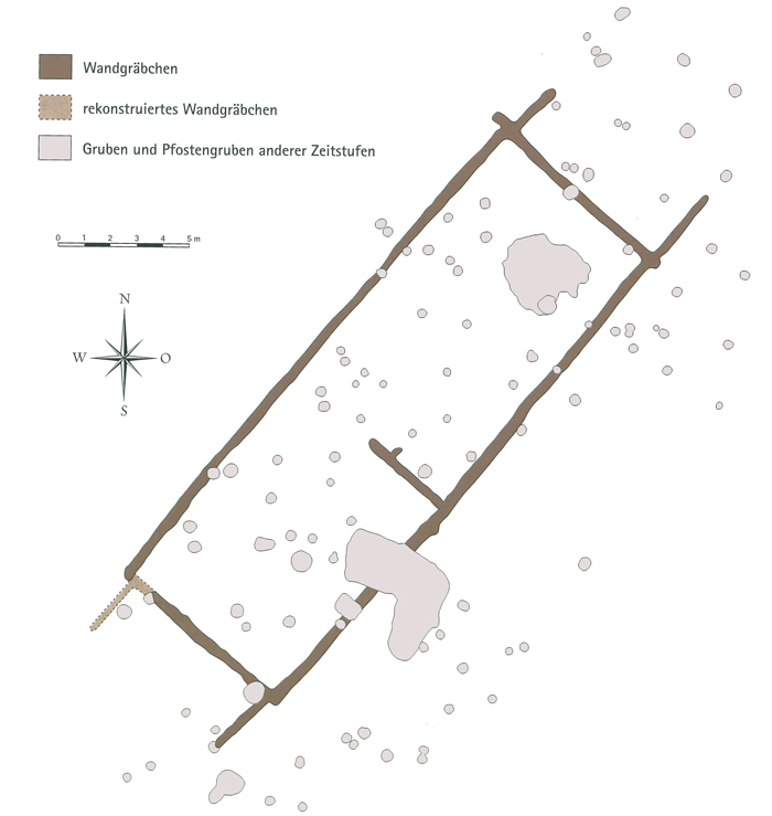 Mittelneolithischer Hausgrundriss aus Rannersdorf, archäologische Großgrabung 2001/2002.